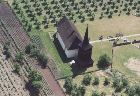 Nyírmihálydi Hungary aerialphotgraphy